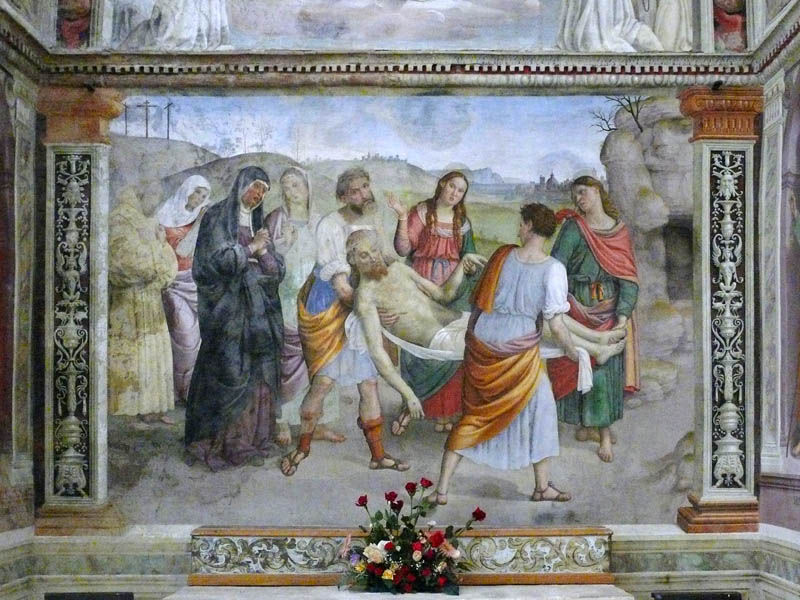 Fresco "Transporto di Cristo al sepolcro", Trevi, Chiesa della Madonna delle Lacrime, Cappella di S. Francesco.